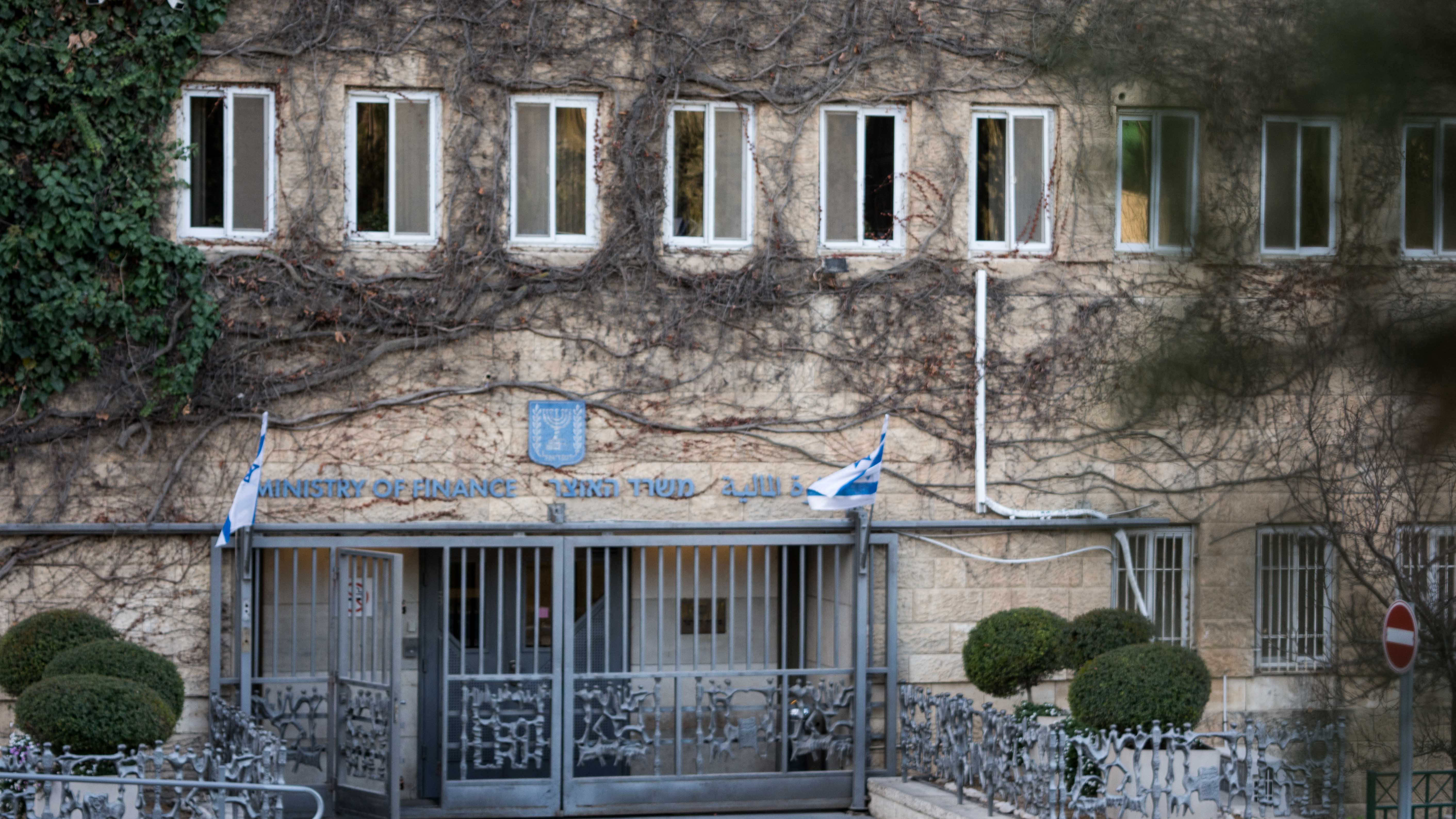 משרד האוצר